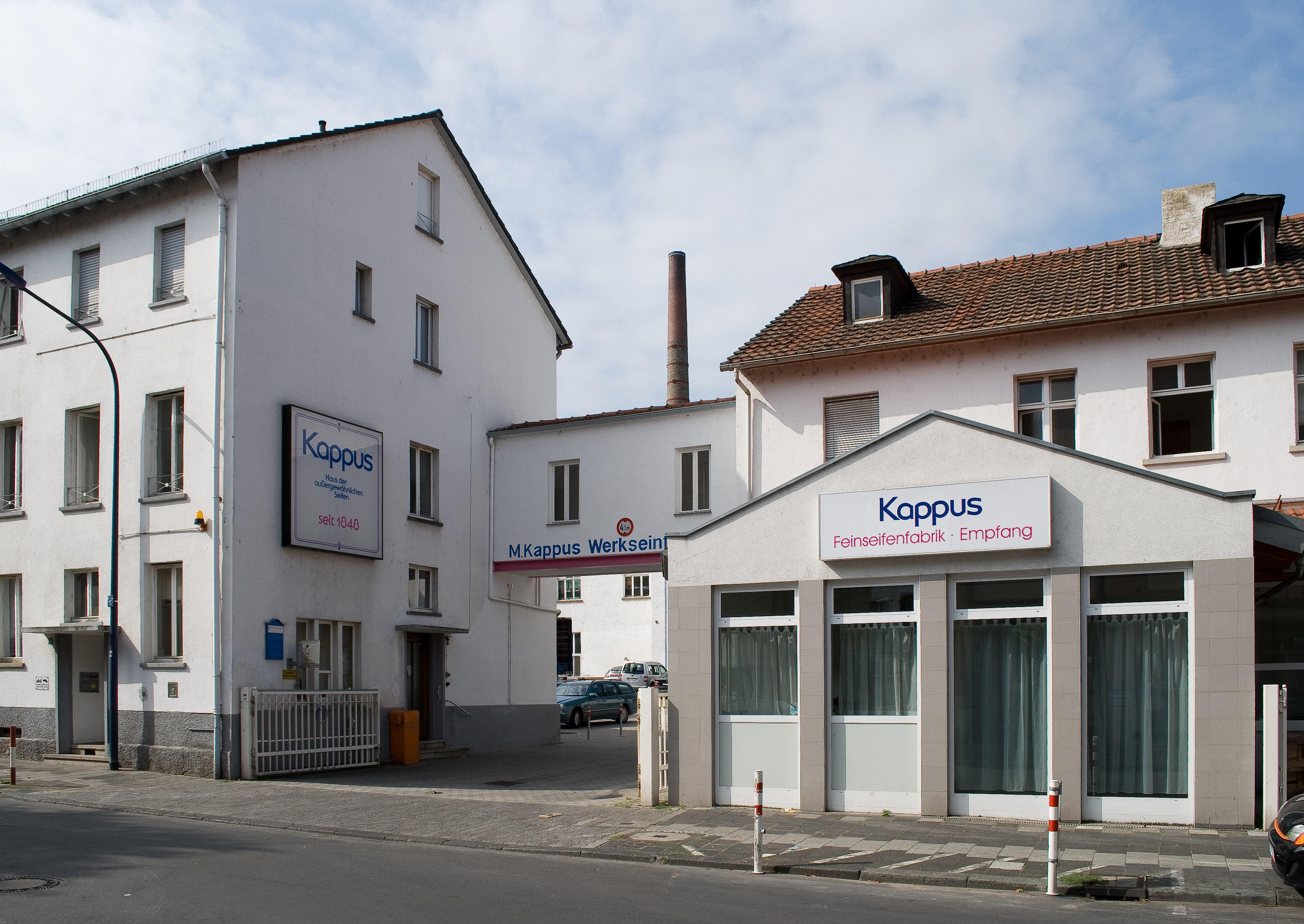 Die M. Kappus GmbH & Co Feinseifen und Parfümeriefabrik in Offenbach am Main ist der größte Seifenhersteller in Westeuropa. Abgebildet ist der Haupteingang in der Luisenstraße.